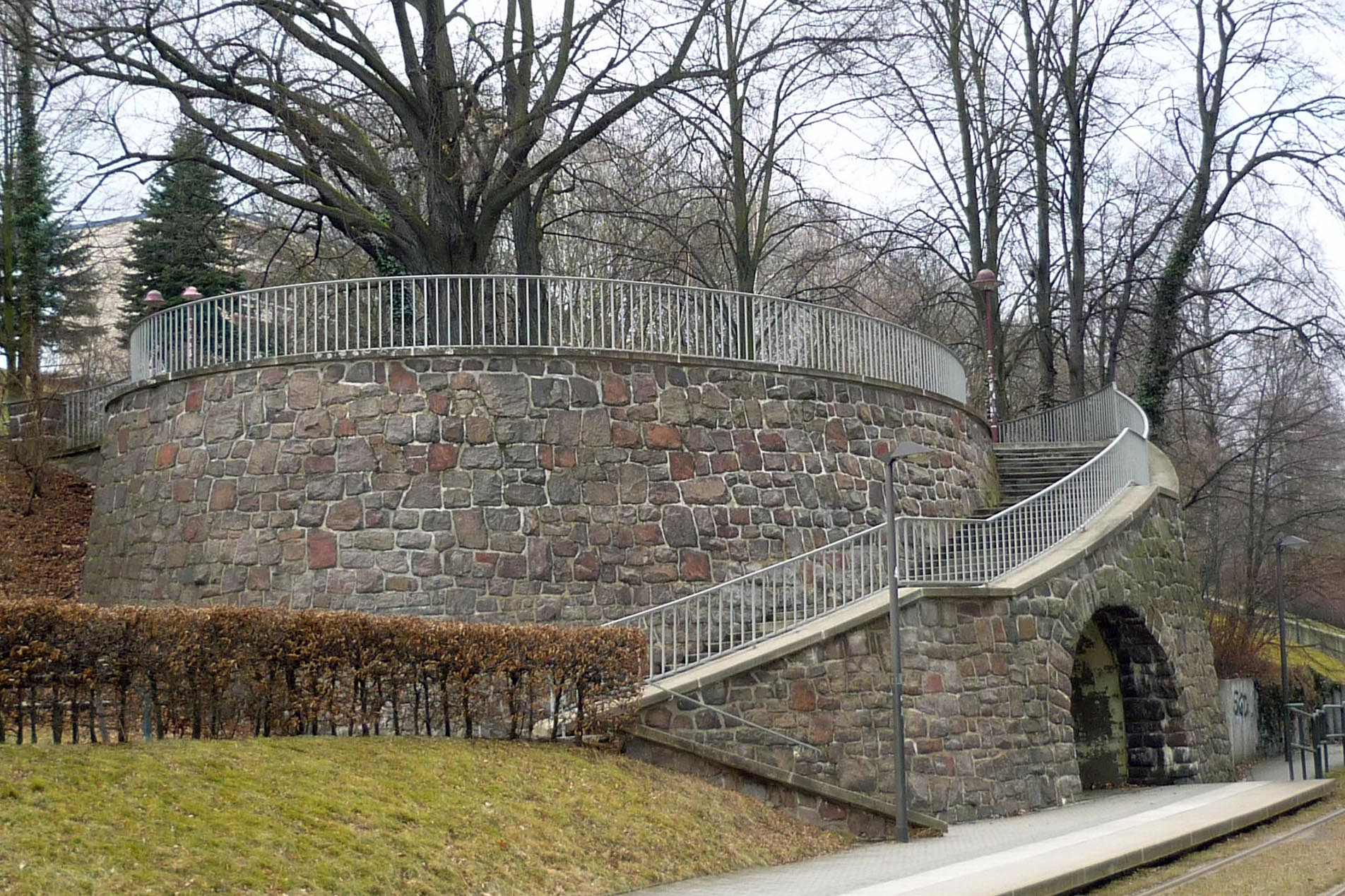 Aussichtsplattform "Liepsch Ruhe" am Westendring in Dresden-Kleinpestitz